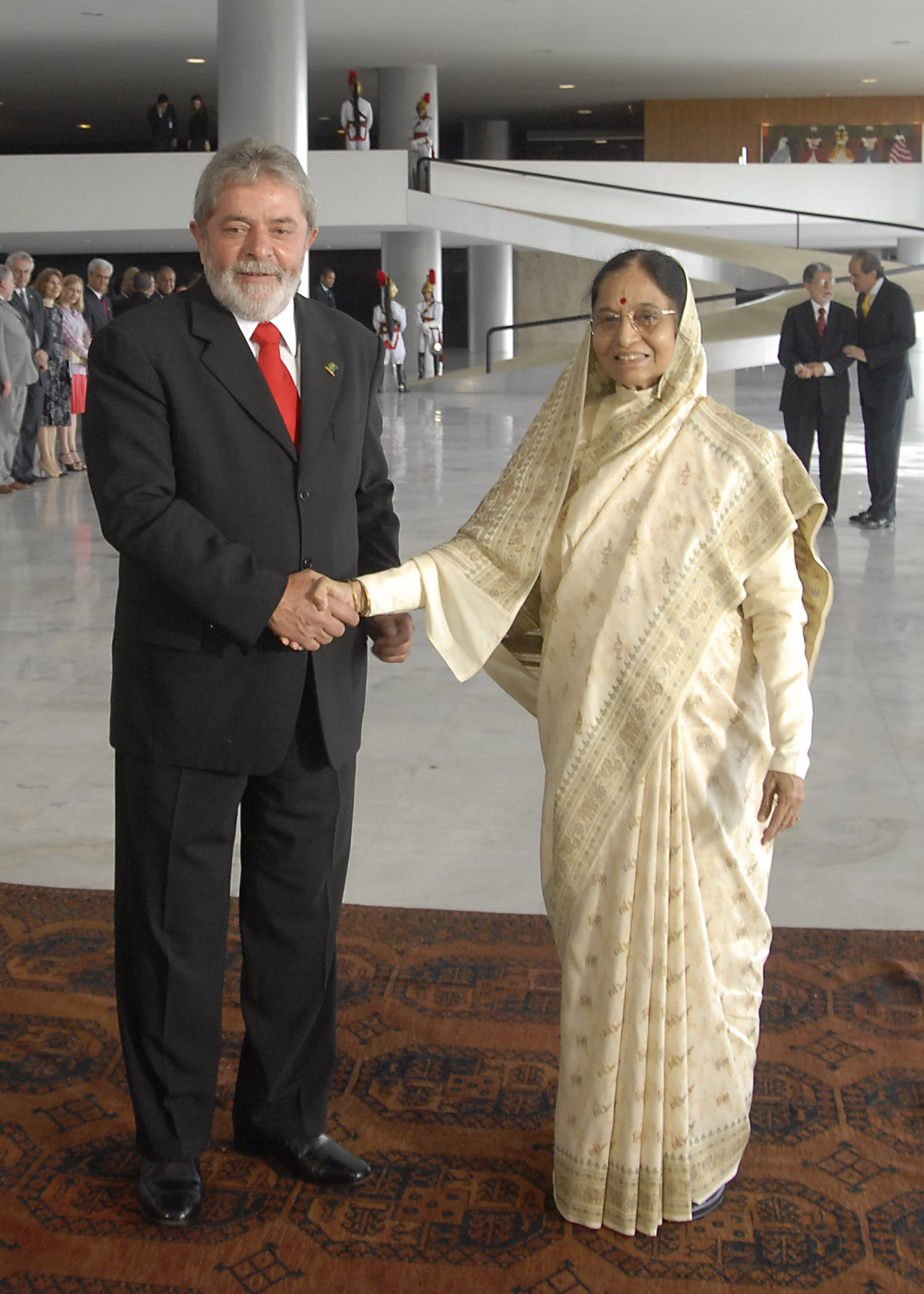 Presidente Lula recebe a presidente da Índia, Pratibha Patil, no Palácio do Planalto. Brasil e Índia mantêm cooperação em algumas áreas, como energia renovável, defesa, cultura e educação